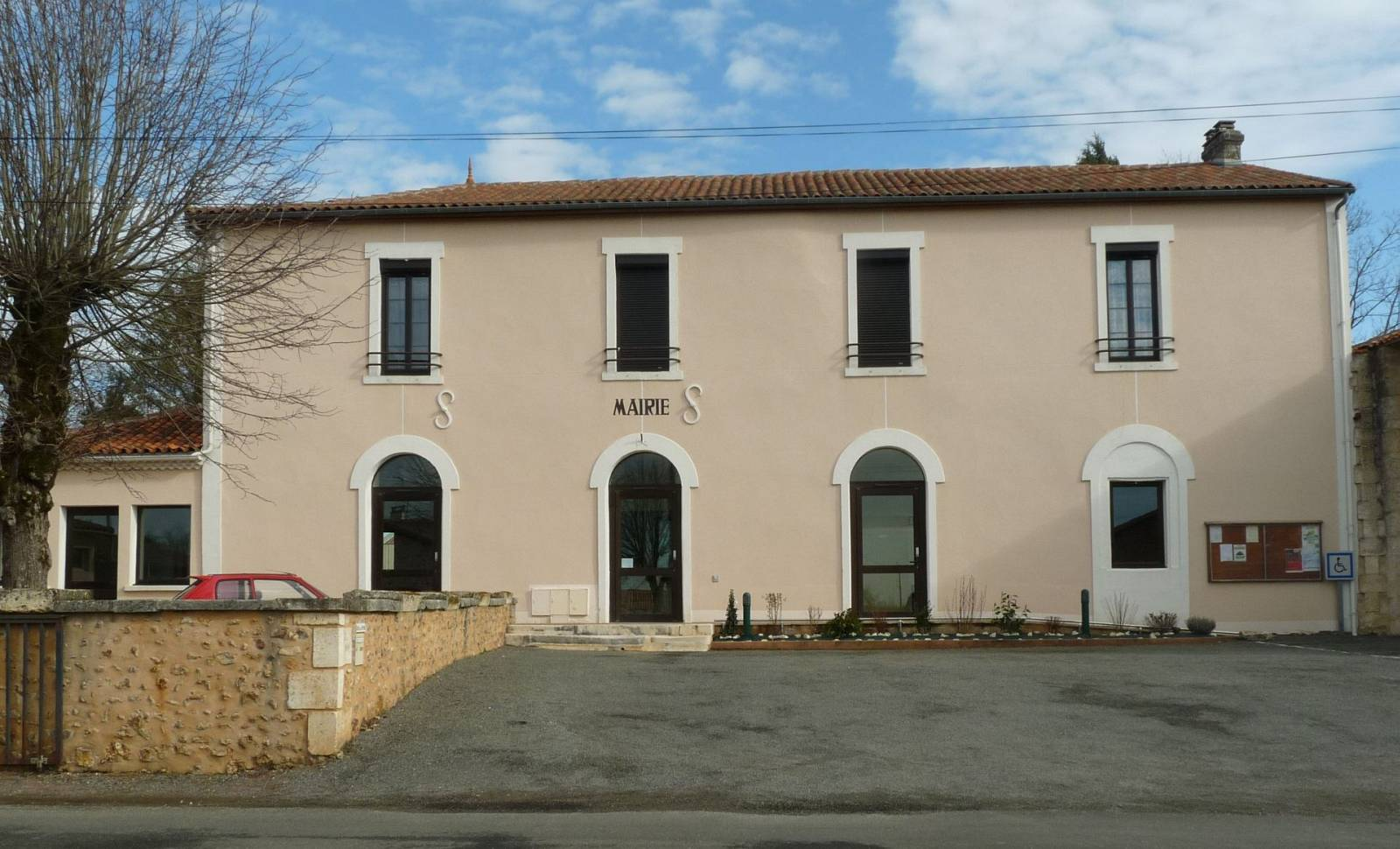 mairie de St-Adjutory, Charente, France